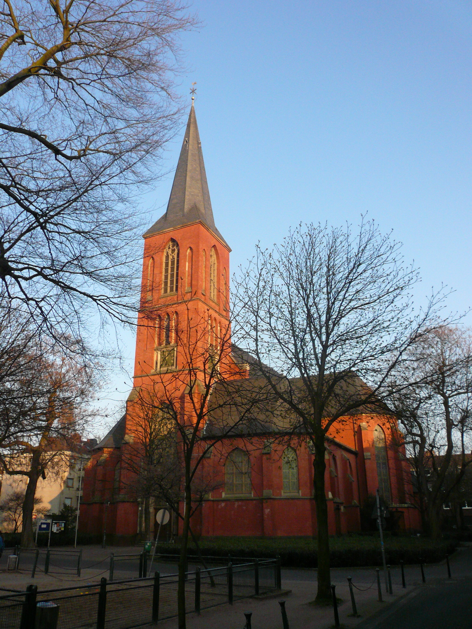 kath. Kirche St. Gertrudis Düsseldorf-Eller, Gertrudisplatz